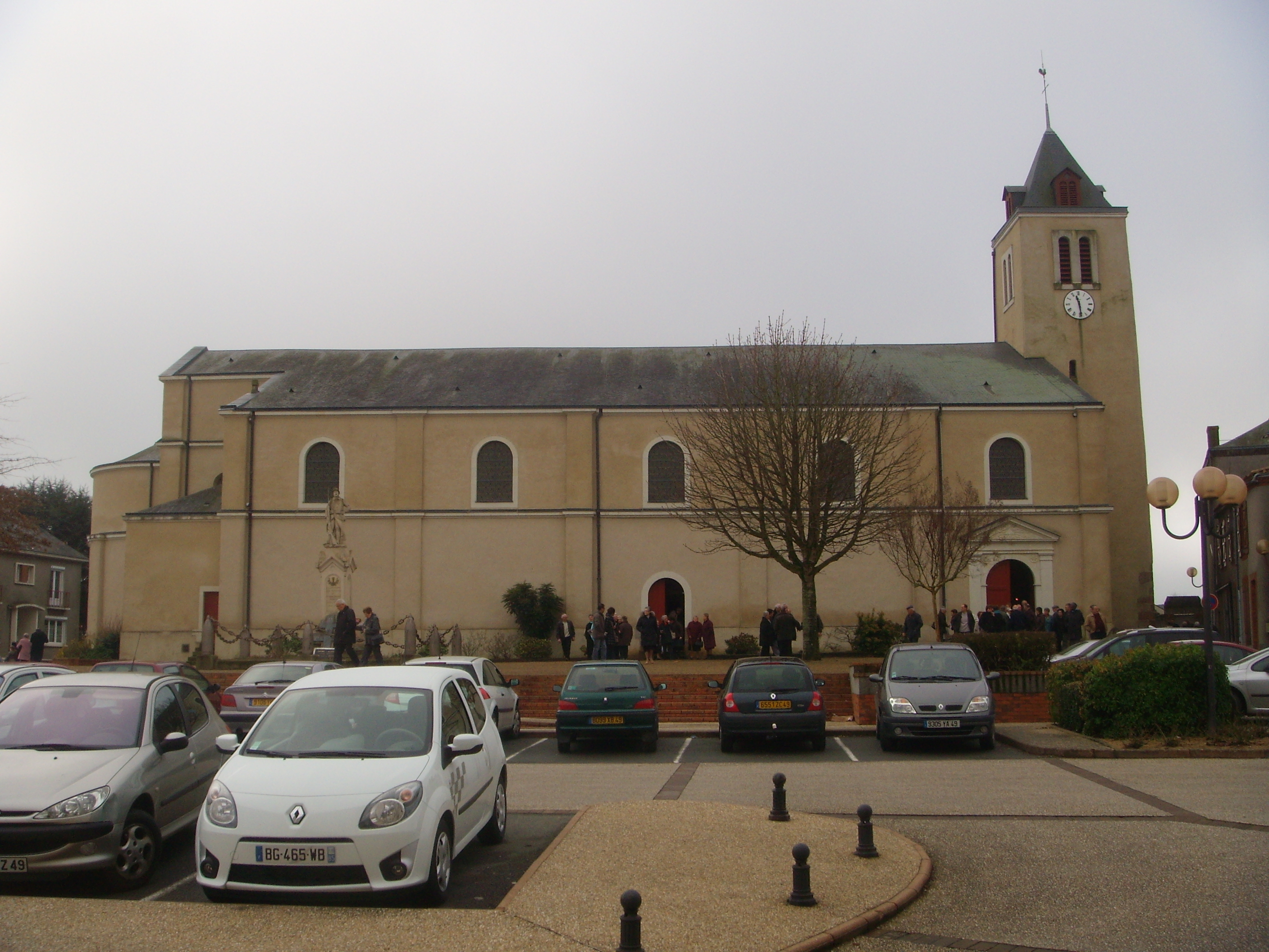 Sortie d'église à Saint Pierre Montlimart